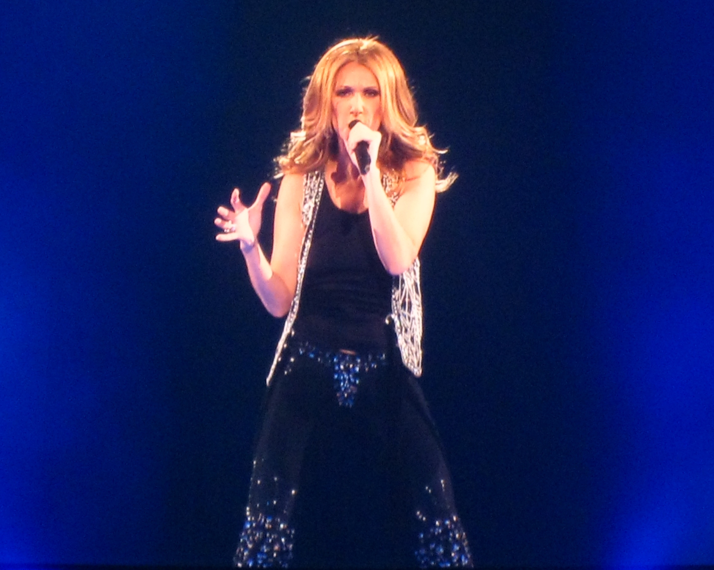 La cantante Celine Dion cantando en vivo